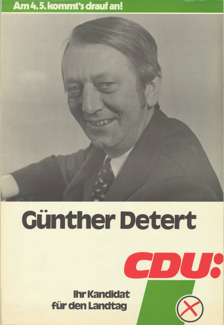 Am 4.5. kommt's drauf an! Günther Detert CDU: Ihr Kandidat für den Landtag Abbildung: Porträtfoto - Stimmkreuz Plakatart: Kandidaten-/Personenplakat mit Porträt Auftraggeber: Verantw.: CDU-Präsidium Nordrhein-Westfalen Objekt-Signatur: 10-009 : 722 Bestand: Landtagswahlplakate Nordrhein-Westfalen (10-009) GliederungBestand10-18: Landtagswahlplakate Nordrhein-Westfalen (10-009) » CDU Lizenz: KAS/ACDP 10-009 : 722 CC-BY-SA 3.0 DE